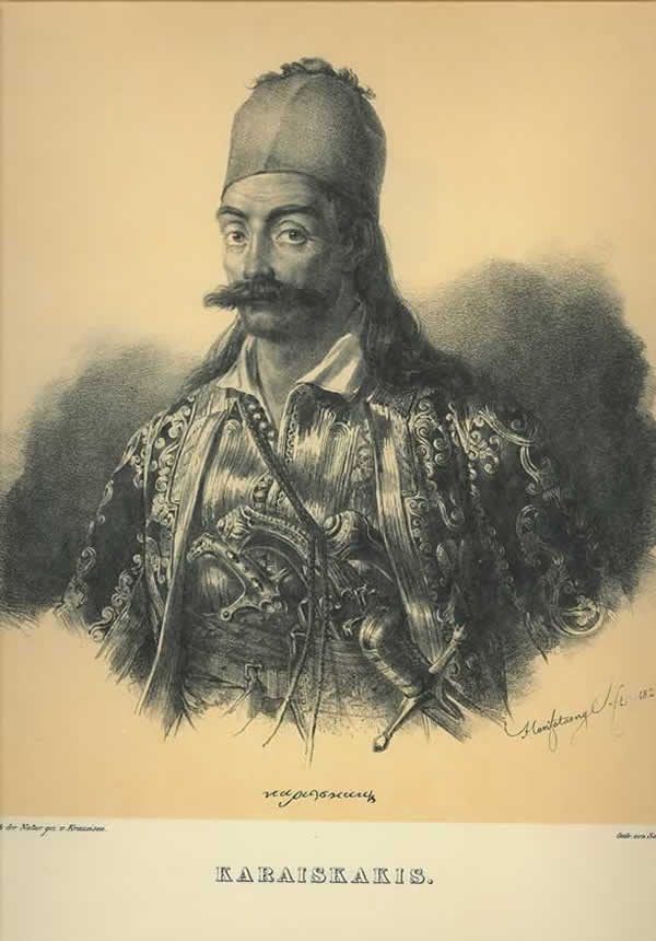 Aπό: Bildnisse ausgezeichneter Griechen und Philhellenen nebst einigen Ansichten und Trachten. Nach der Natur gezeichnet und herausgegeben von Karl Krazeisen. Munchen 1831